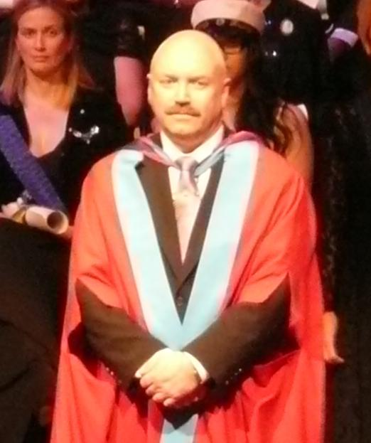 Roland S. Persson installeras som professor vid Högskolan i Jönköping